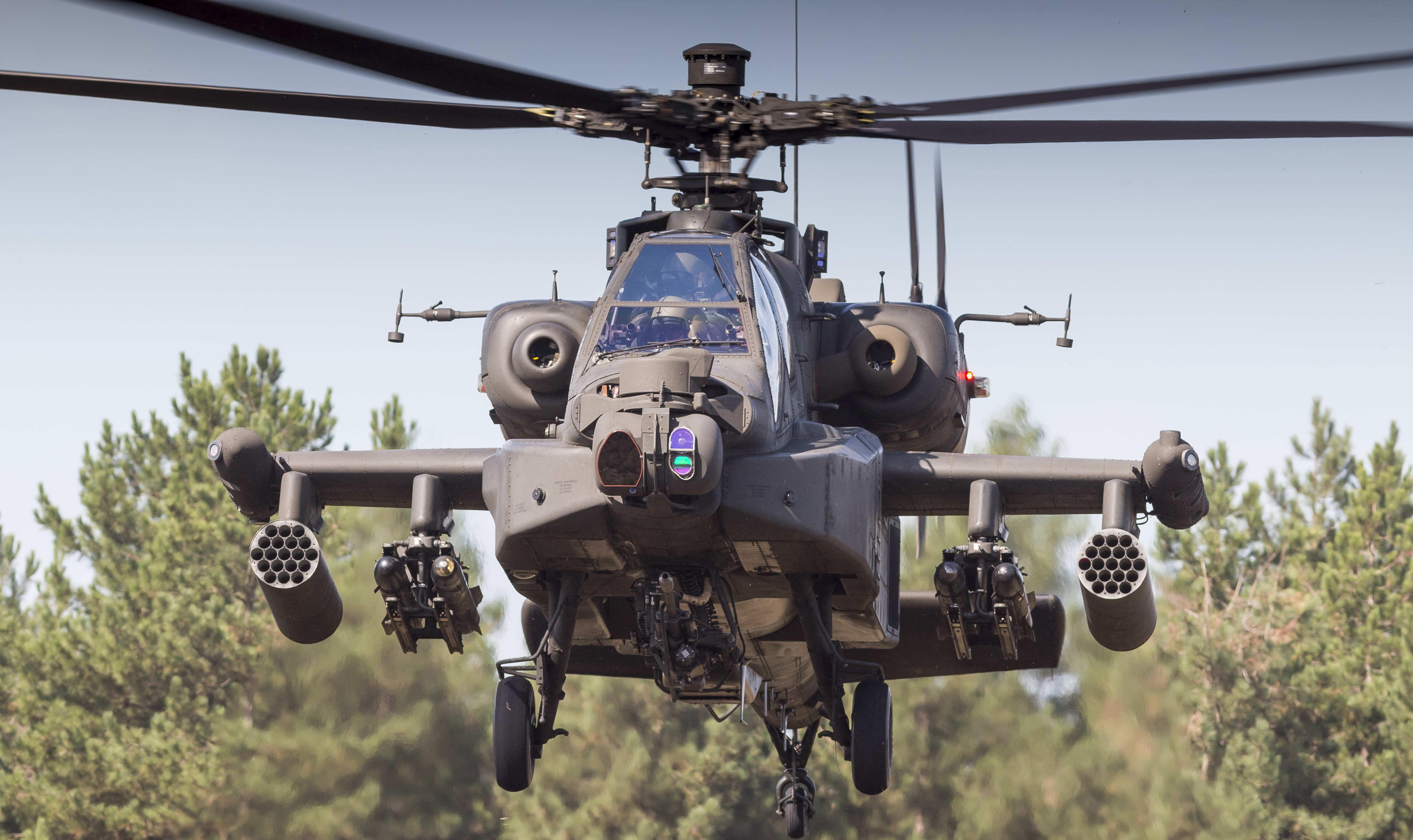 Oirschotse Heide, the Netherlands